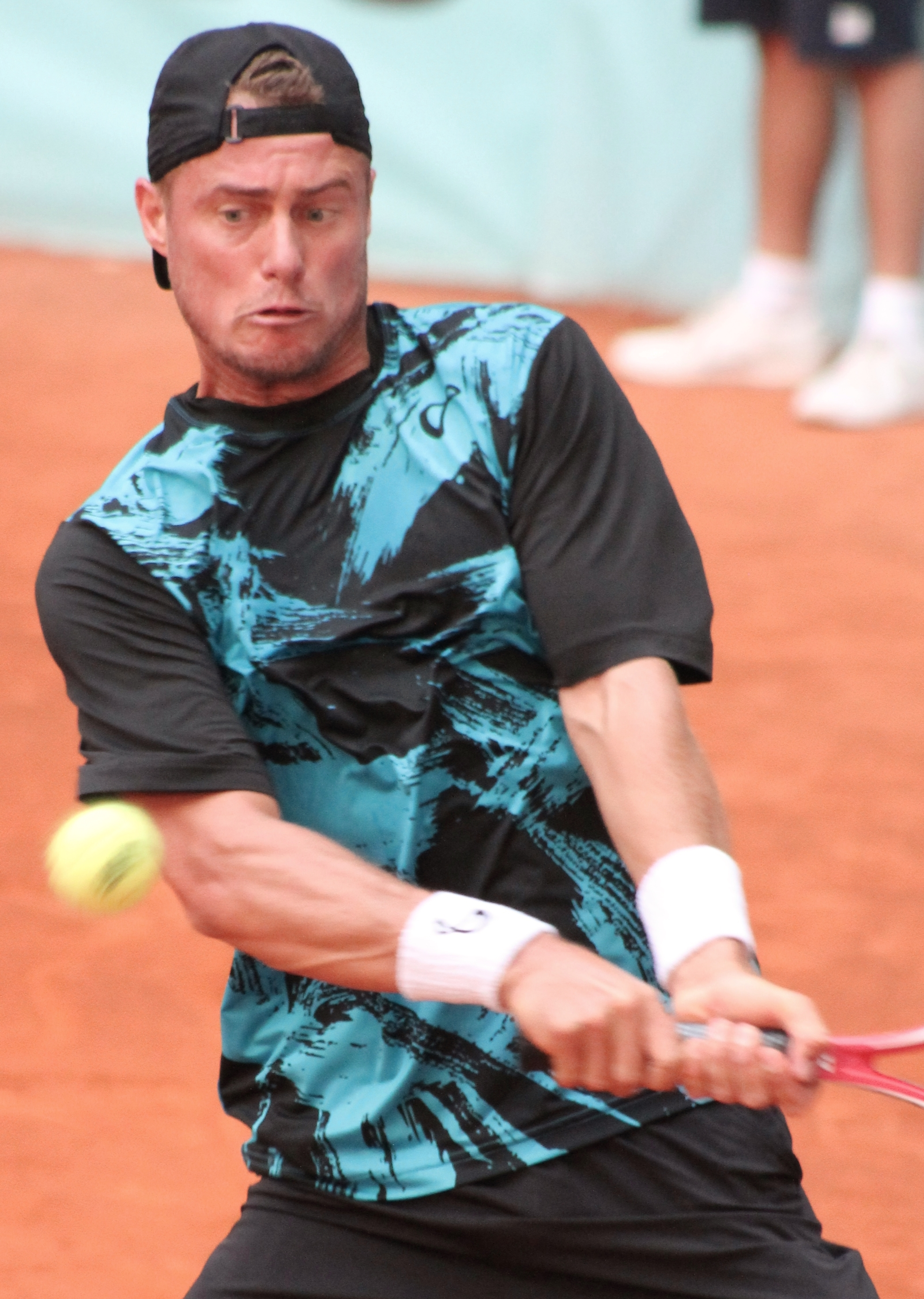 Hewitt MA14 (24)